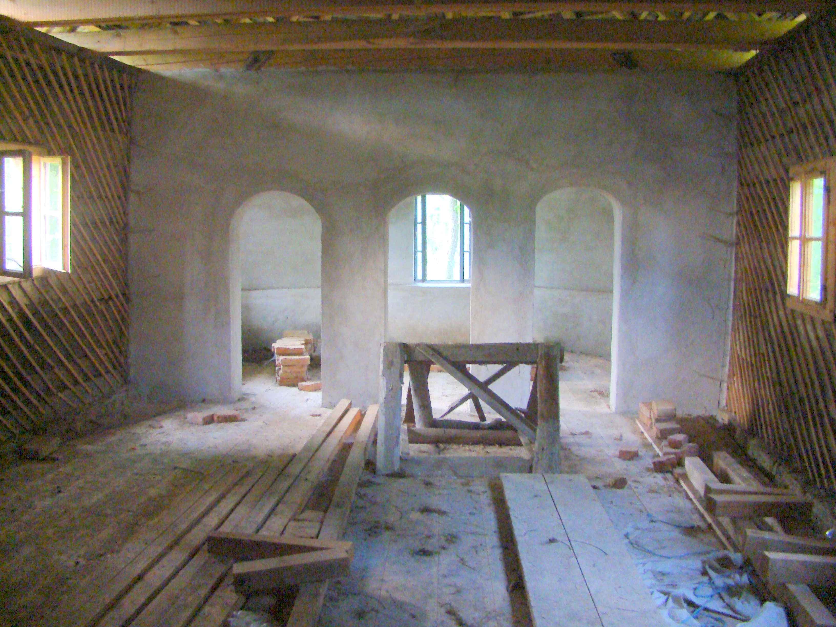 Biserica de lemn „Cuvioasa Paraschiva”, sat Grânari; comuna Jibert, str. Școlii, în cimitirul ortodox vechi sec. XVIII